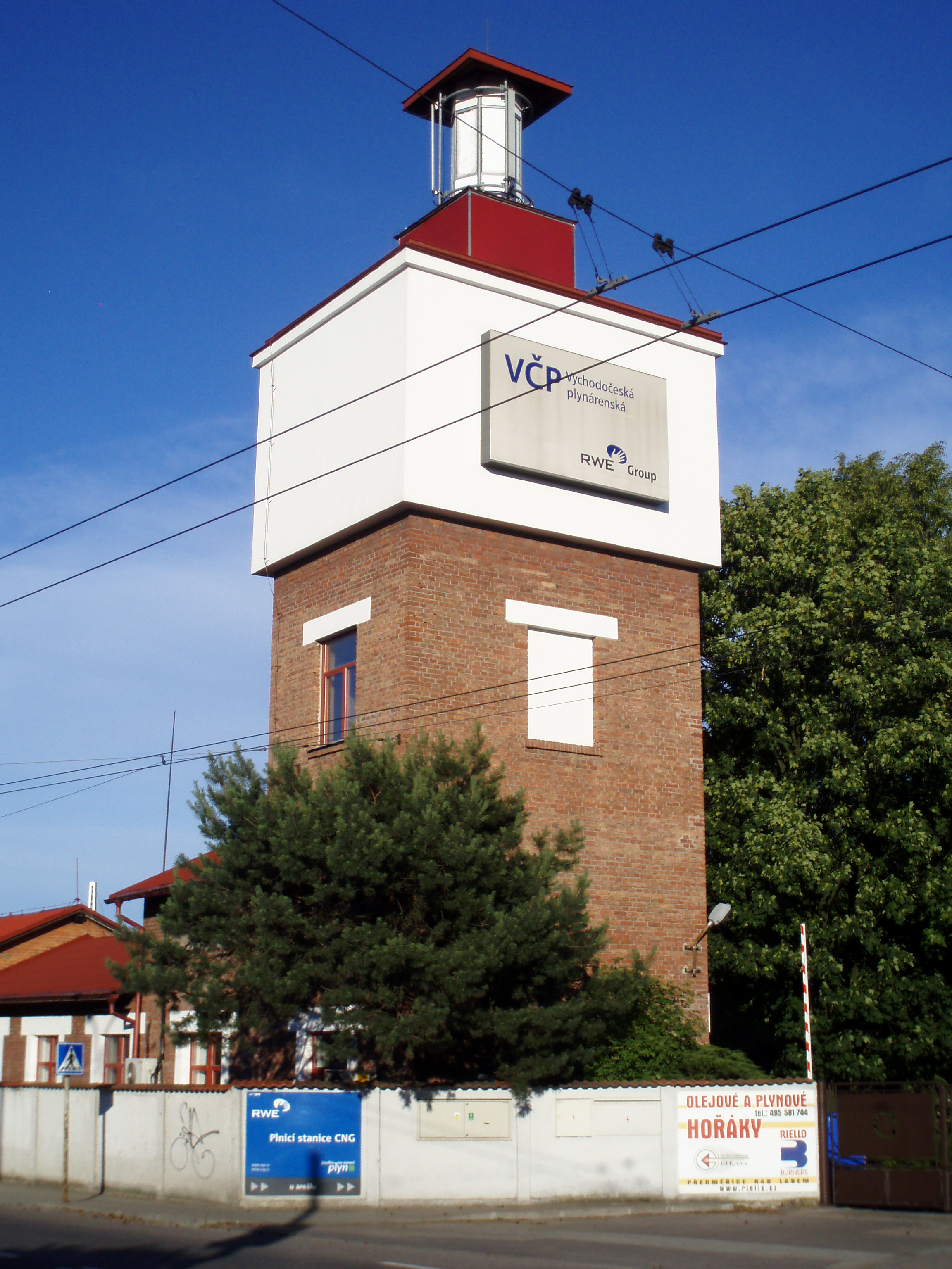 Městská plynárna v Kuklenách, Pražská třída 602/1.